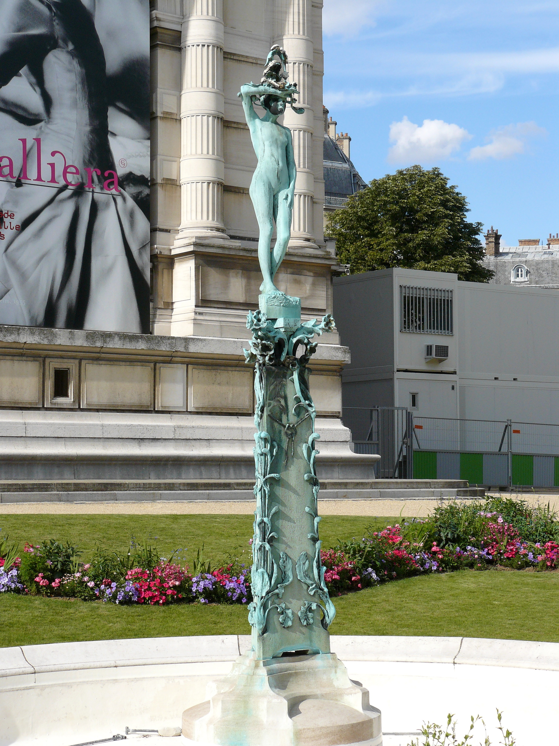 Fontaine d'Avril, au centre du bassin, un pylône en bronze, où est inscrite la phase « Il est gentil le mois d'avril qui n'ait son chapeau au grésil », supporte une statue. Sculpteur Pierre Roche 1906. Square Brignole Galliera, derrière le Palais Galliera, musée de la Mode, place de Tokyo, avenue du Président-Wilson, Paris (16e arrond.)